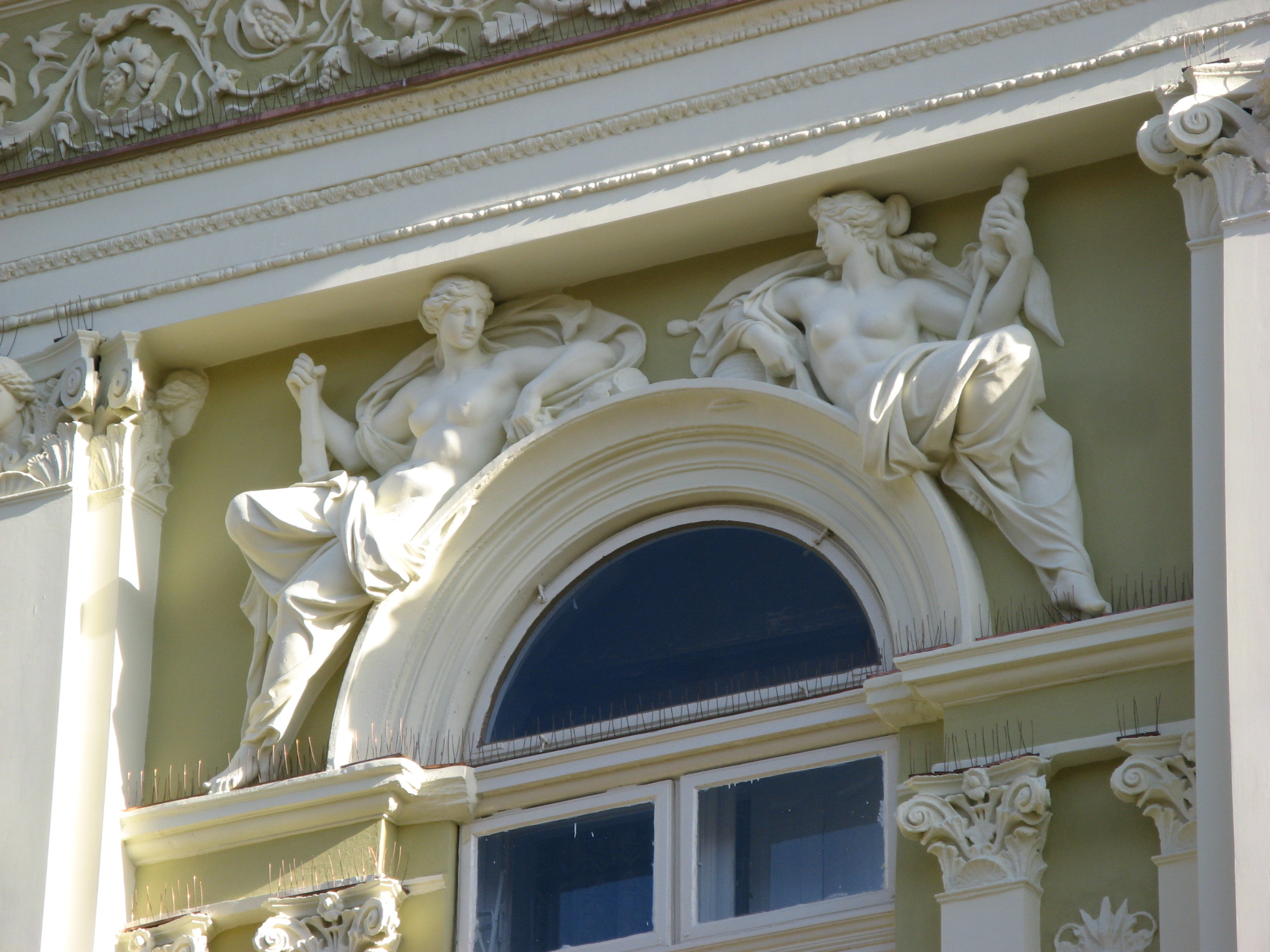 ички архитекта Титус Мачковић пројектовао је најамну палату 1881. године за Самка Манојловића. Једноспратни угаони објекат у облику правоугаоника, изграђен је у стилу еклектике са доминантним елементима неоренесансе.